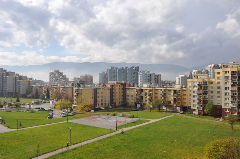 Alipašino danju